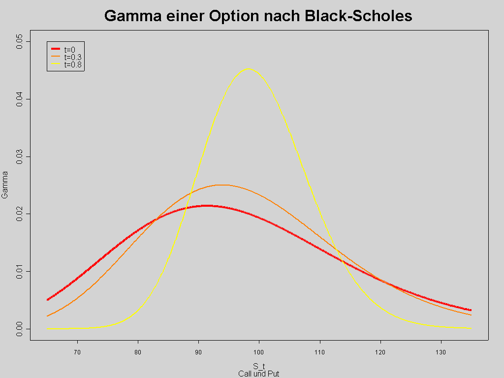 Das Gamma für eine europäische Option (Put und Call) nach Black Scholes zu verschiedenen Zeitpunkten